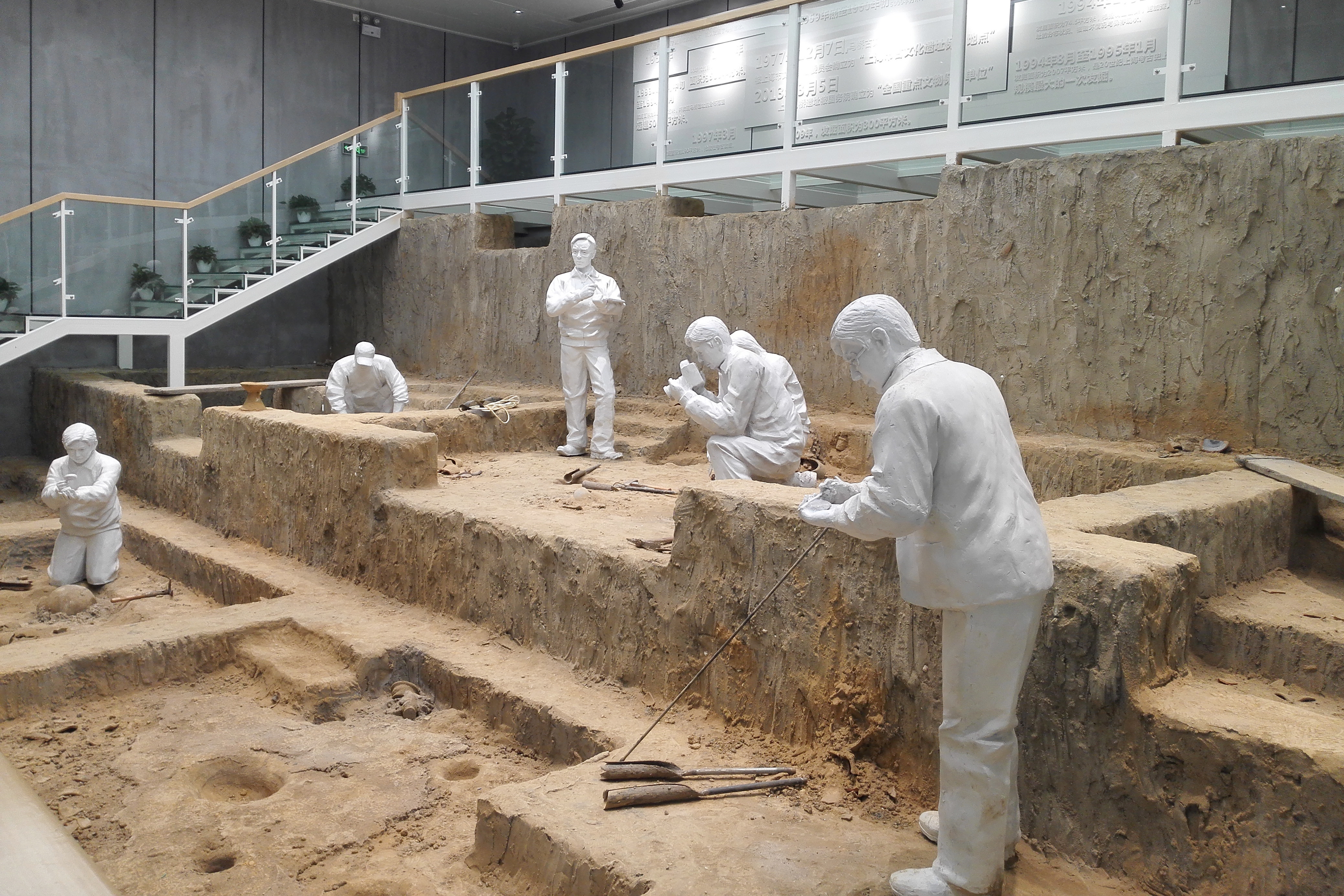 中文（中国大陆）: 上海闵行马桥文化展示馆内景，马桥文化展示馆位于马桥遗址处